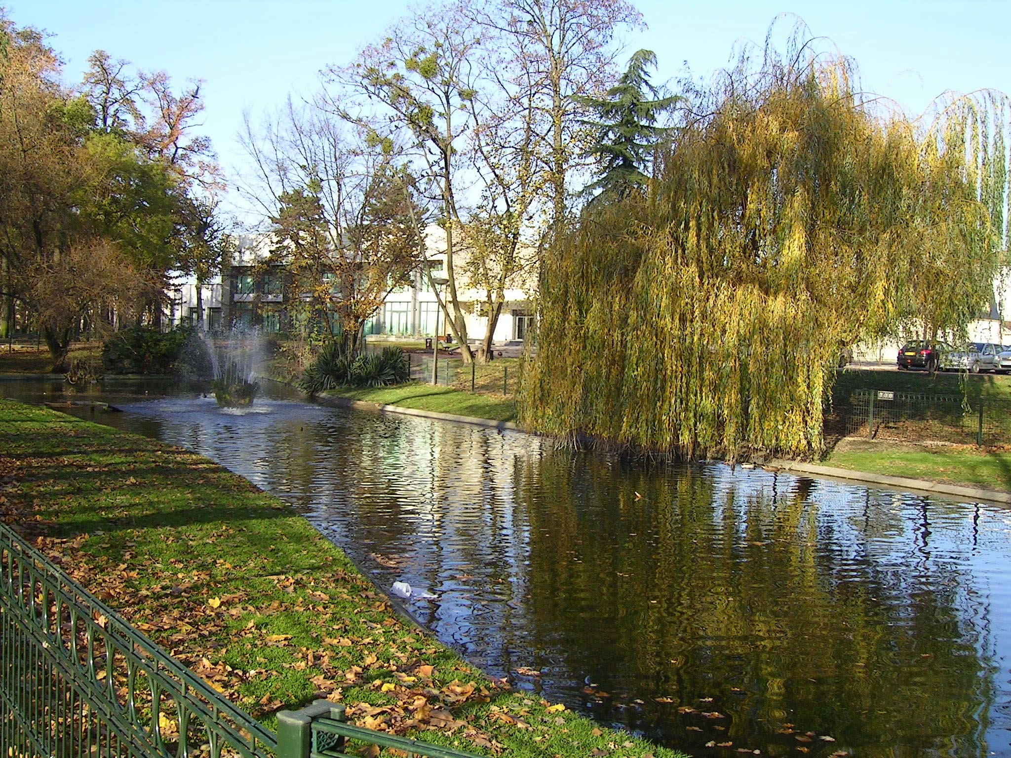 Livry-Gargan (France) - Parc de la mairie.